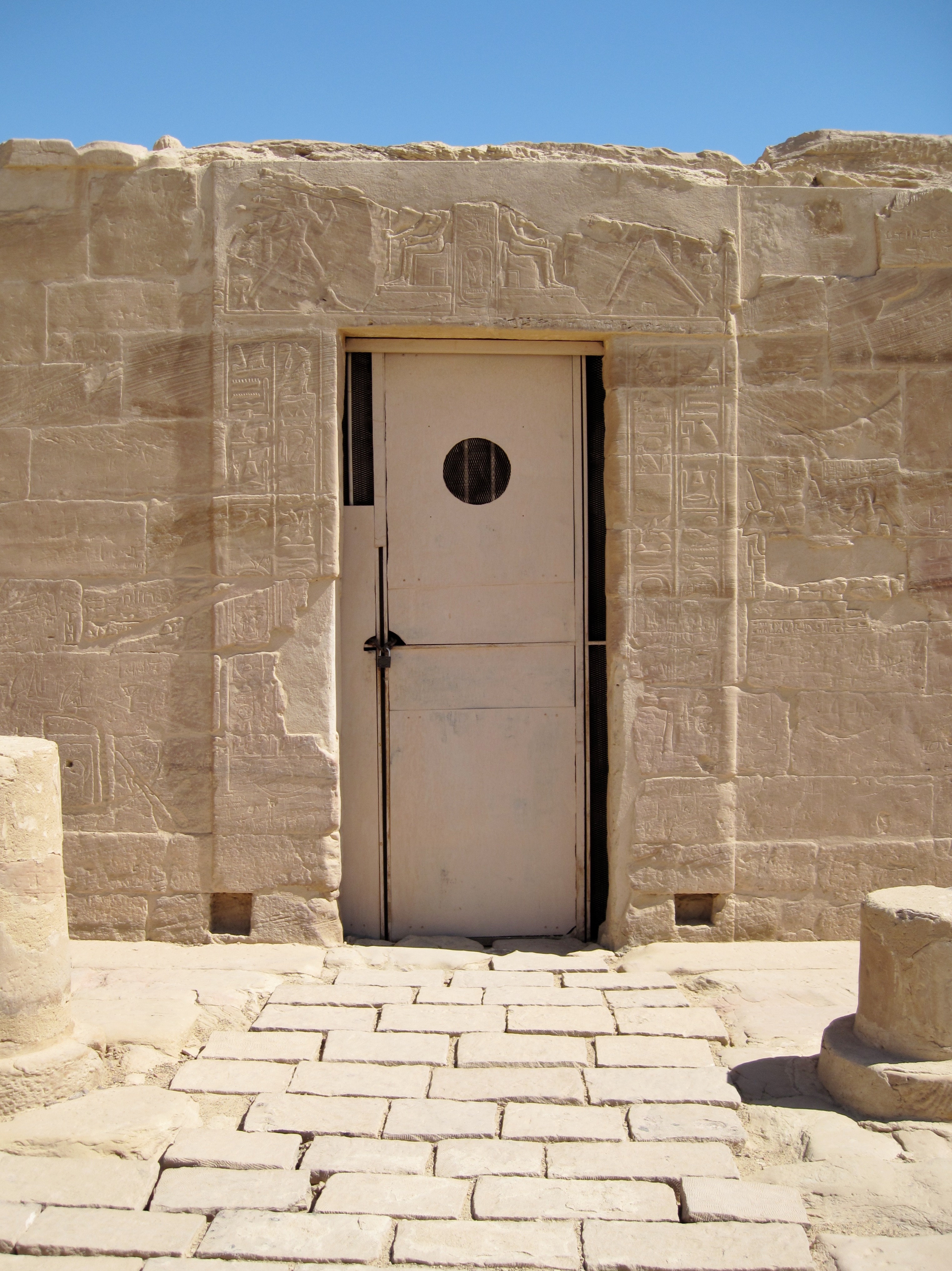 Eingang zum Tempel Amenophis’ III., gewidmet Nechbet und Hathor, nahe dem altägyptischen Necheb (heute el-Kab), Ägypten